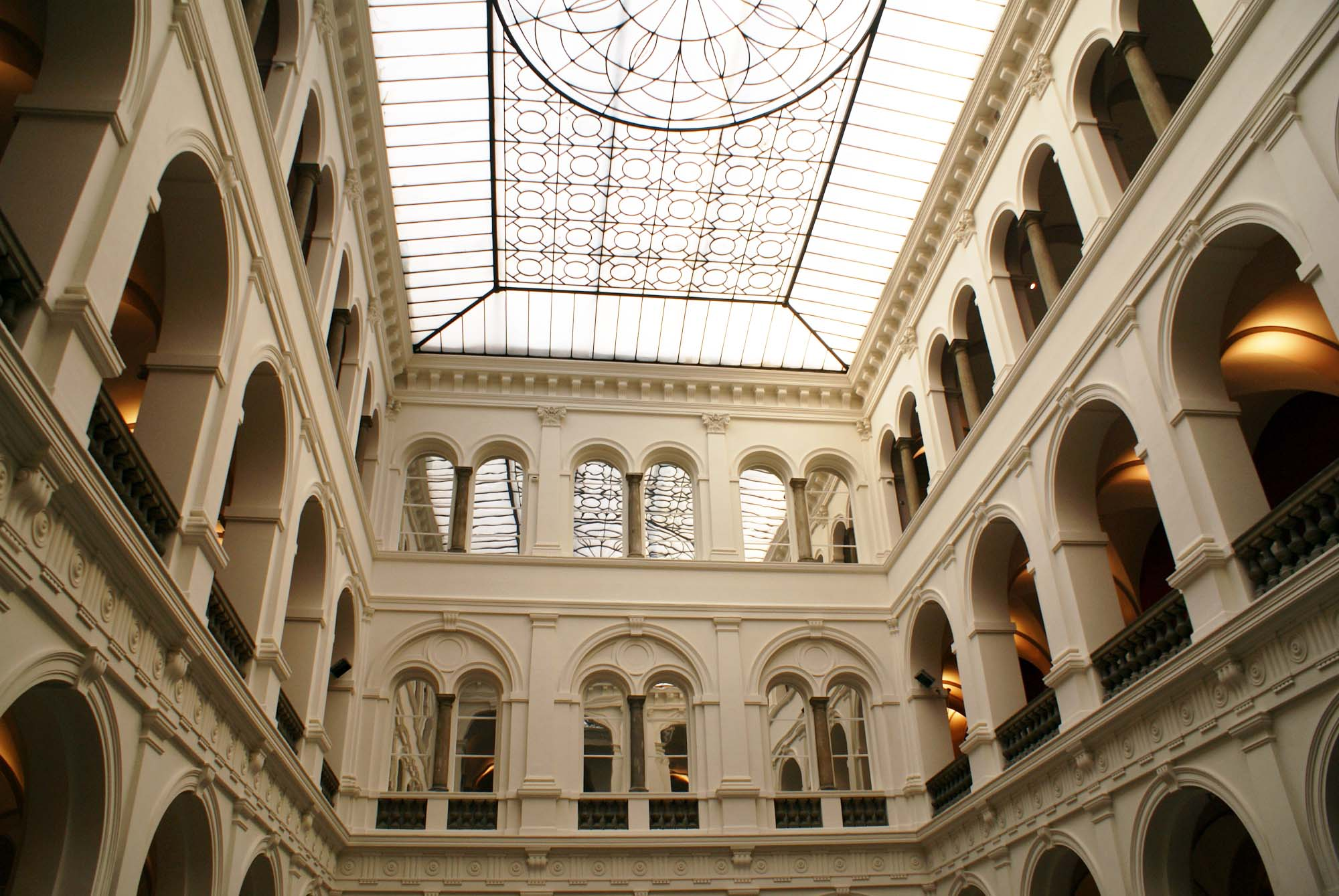 Wrocław, gmach Muzeum Narodowego, 1883-1886